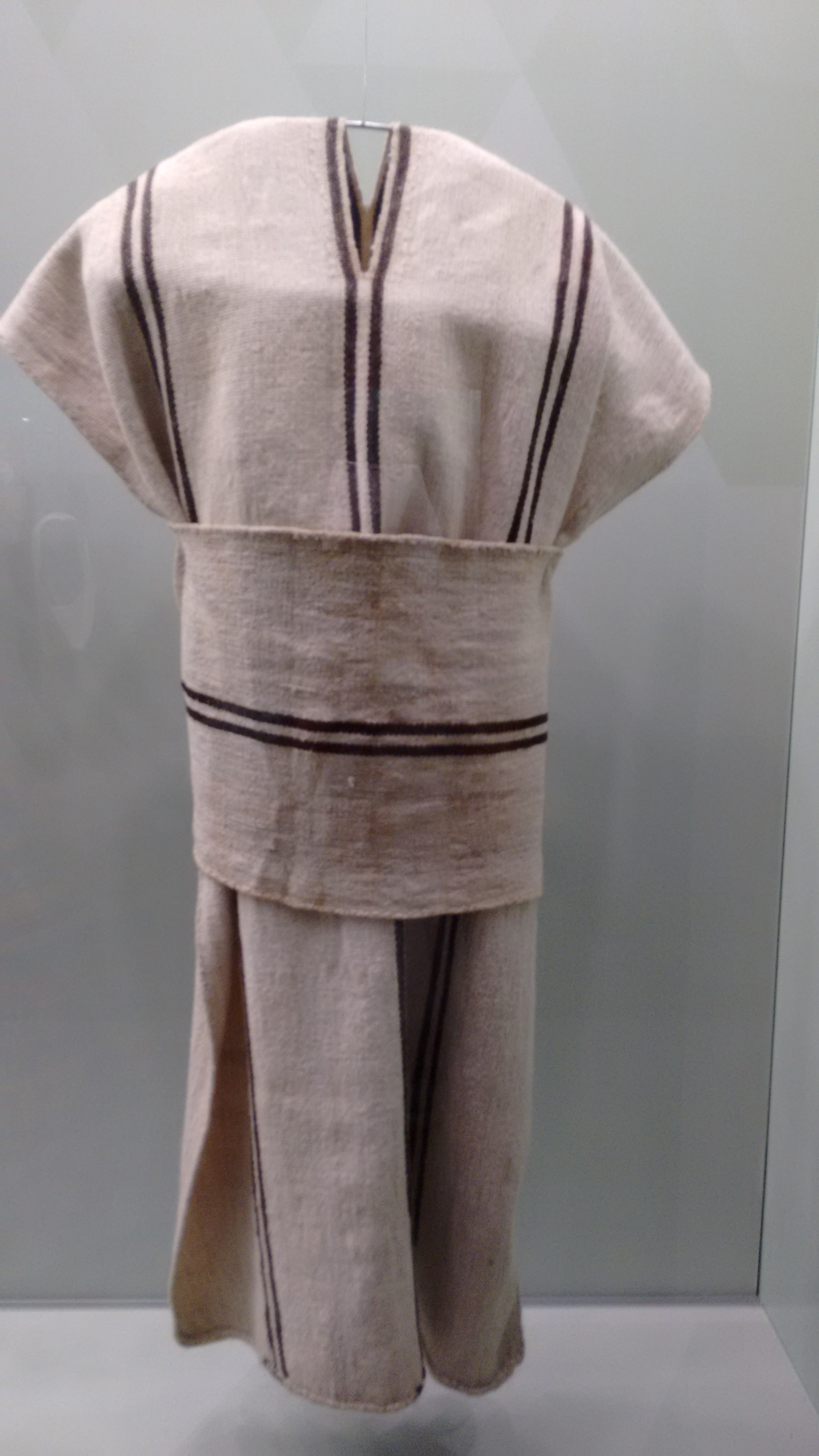 Atuendo Guane, Zippasgo Inga Chibcha Wuanentá Hunzaá